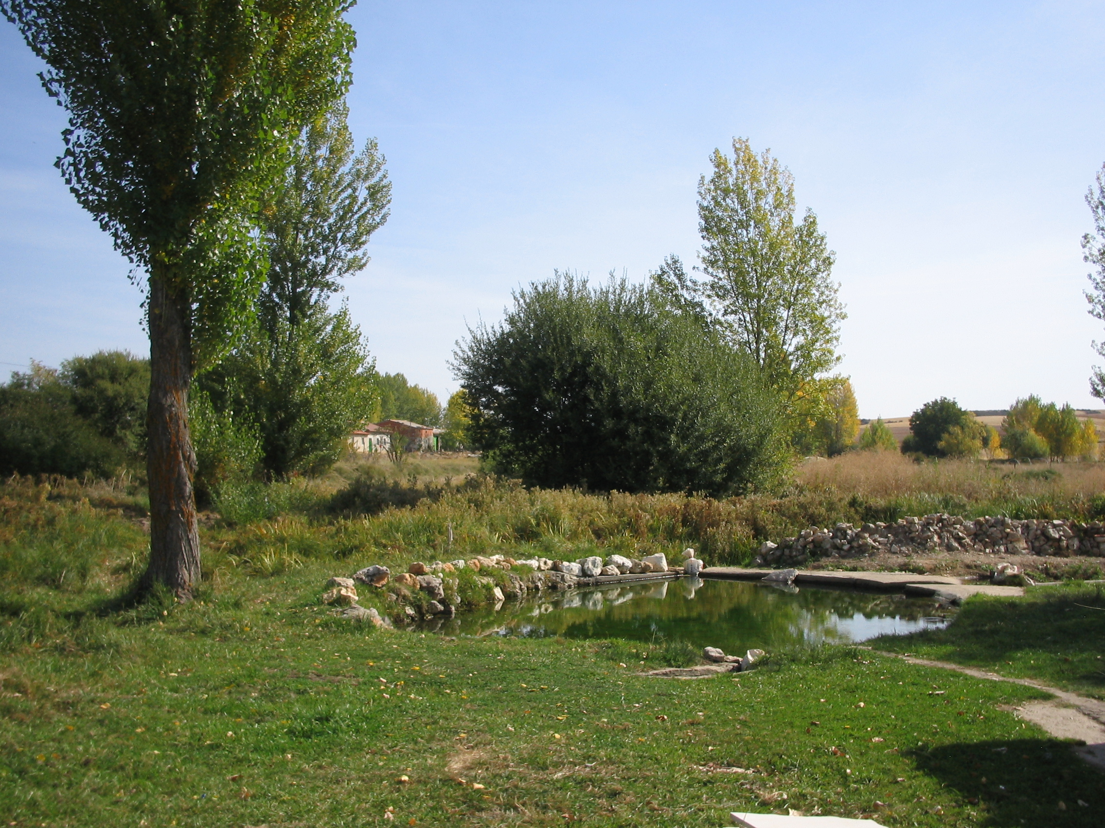 Laguna de Santervás del Burgo (Soria)